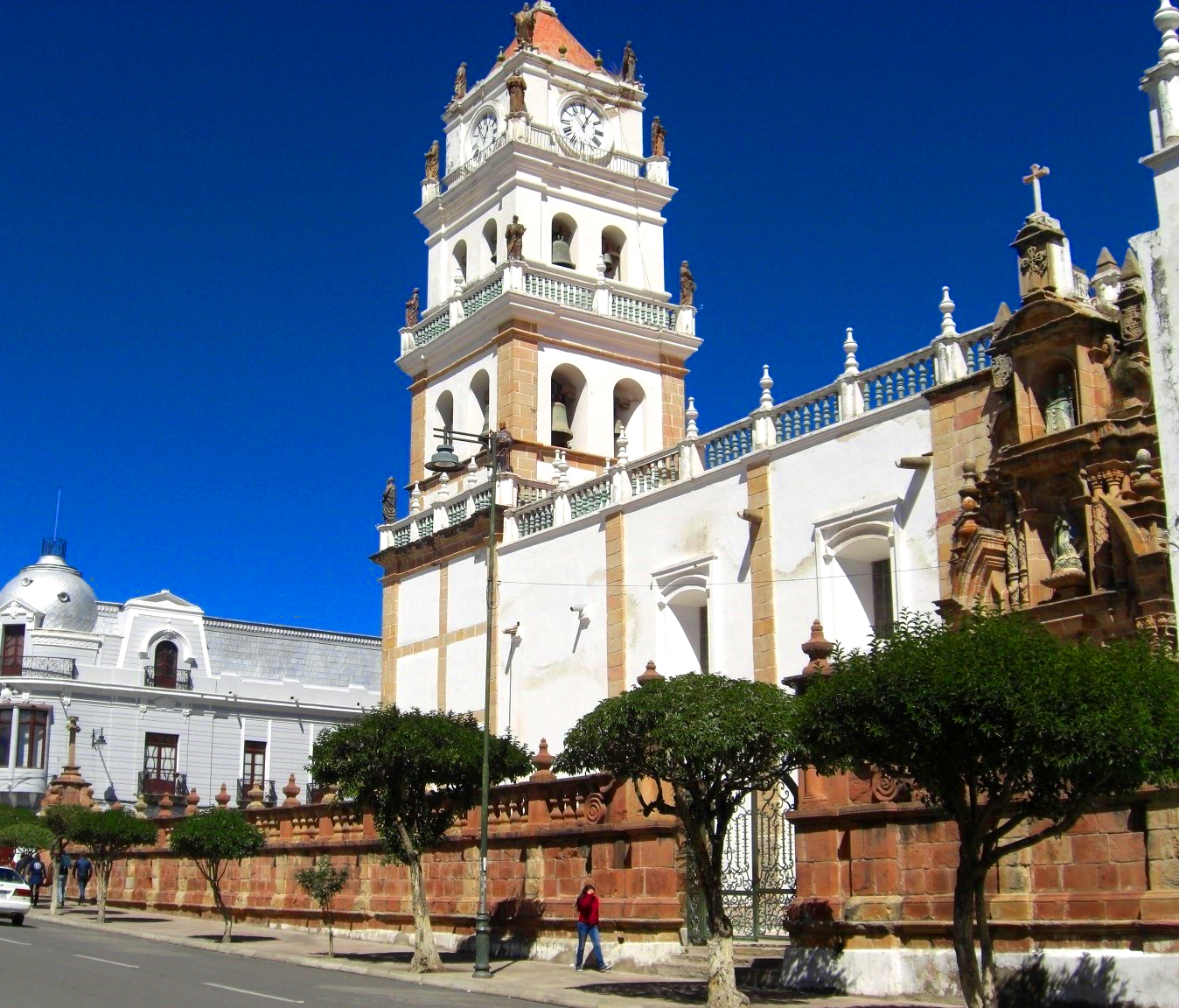 Catedral (plaza principal) This medium shows the protected monument with the number H/00-001 in Bolivia.